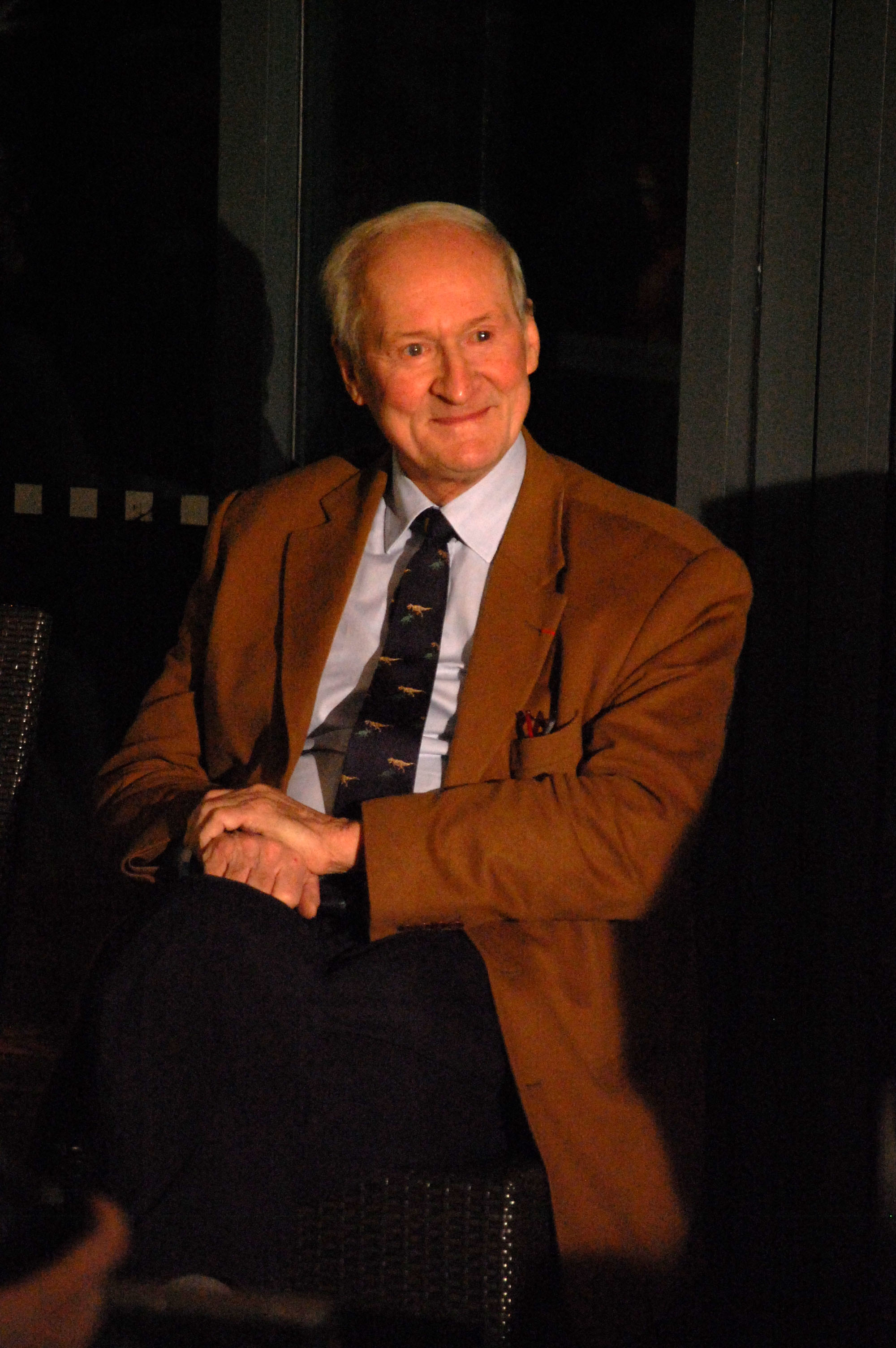 Philippe Taquet - Espace des sciences - 16-01-2013